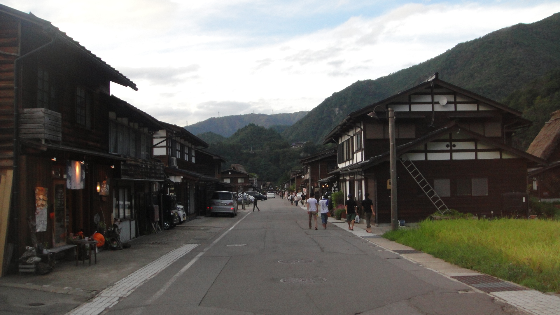 岐阜県大野郡白川村の本通り